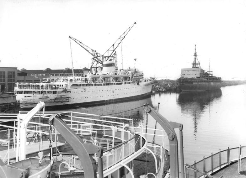 Wismar, Mathias-Thesen-Werft, Ausrüstungskai Zentralbild Mellahn 24.9.1958 Mathias-Thesen-Werft, Wismar UBz: Das Seefahrgastschiff "Felix Dserschinski" am Ausrüstungskai. Im Hintergrund der sowjetische Eisbrecher "Krassin".